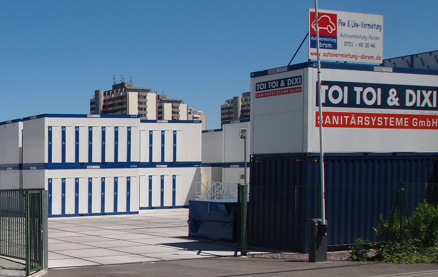 Duschcontainerlager in Durlach